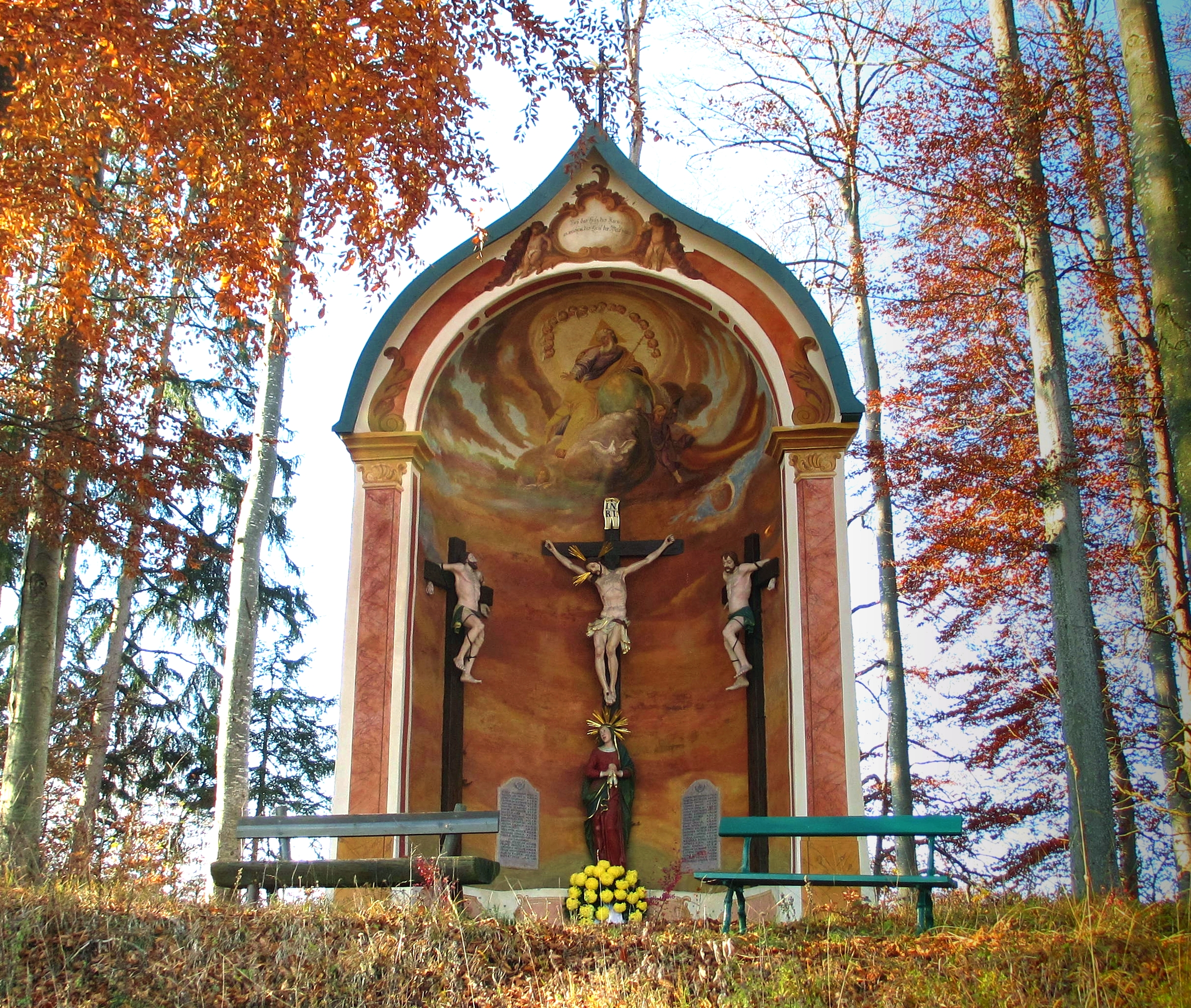 Starnberg, OT Perchting, Seefelder Straße 11. Die Kalvarienbergkapelle, eine halbrunde Kapellennische auf einem Moränenhügel nordwestlich des Dorfes, stammt aus der Barockzeit und soll der Erzählung nach aufgrund eines Gelübdes um 1705 errichtet worden sein. Seit dem späten 19. Jahrhundert bildet sie den Abschluß eines in der Nähe gelegenen Kreuzweges. Am Fuße der Kapelle befinden sich Gedenktafeln mit den Namen der aus den beiden Weltkriegen nicht mehr heimgekehrten Mitbürger des Pfarrdorfes Perchting.